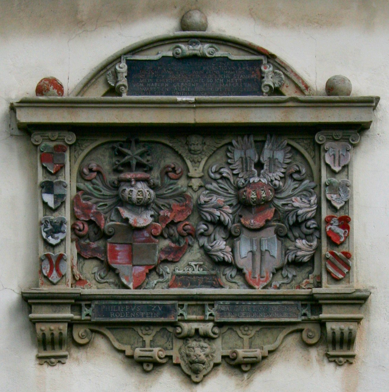 Wappen der Herren von Rodenstein; Allianzwappen mit den Herren von Habern (2 Äxte) am Hofgut der Freiherren von Gemmingen-Hornberg in Fränkisch-Crumbach